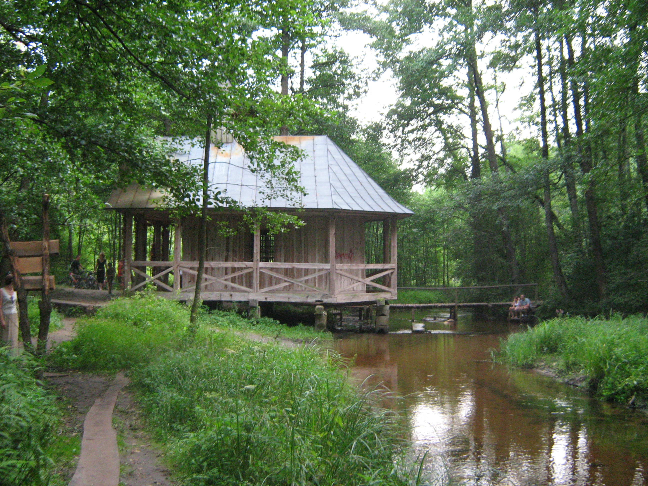 Kapliczka "na wodzie" w Górecku Kościelnym (powiat biłgorajski)